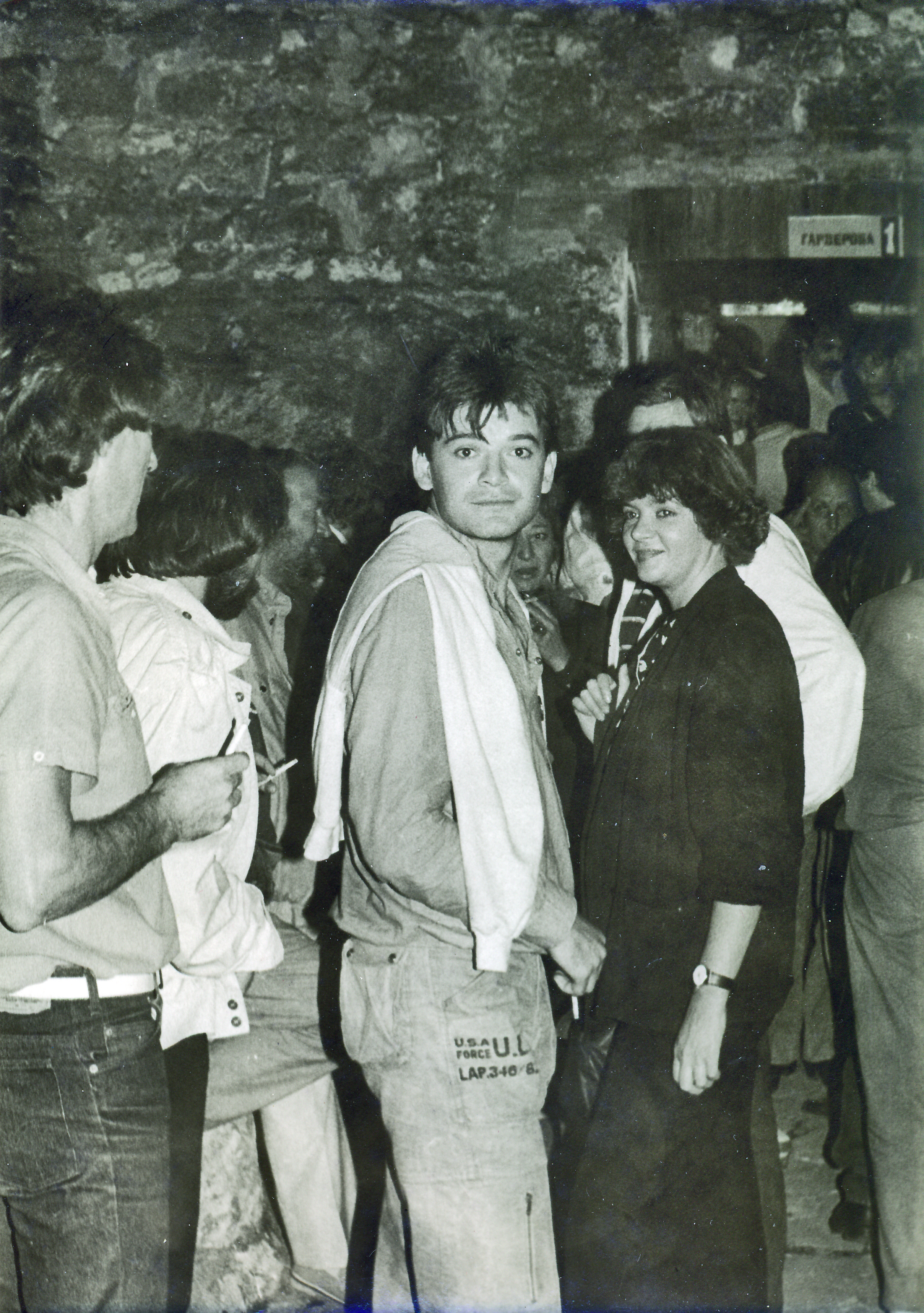 Tihomir Arsić i Gorica Popović na Filmskim susretima u Nišu 1984. godine